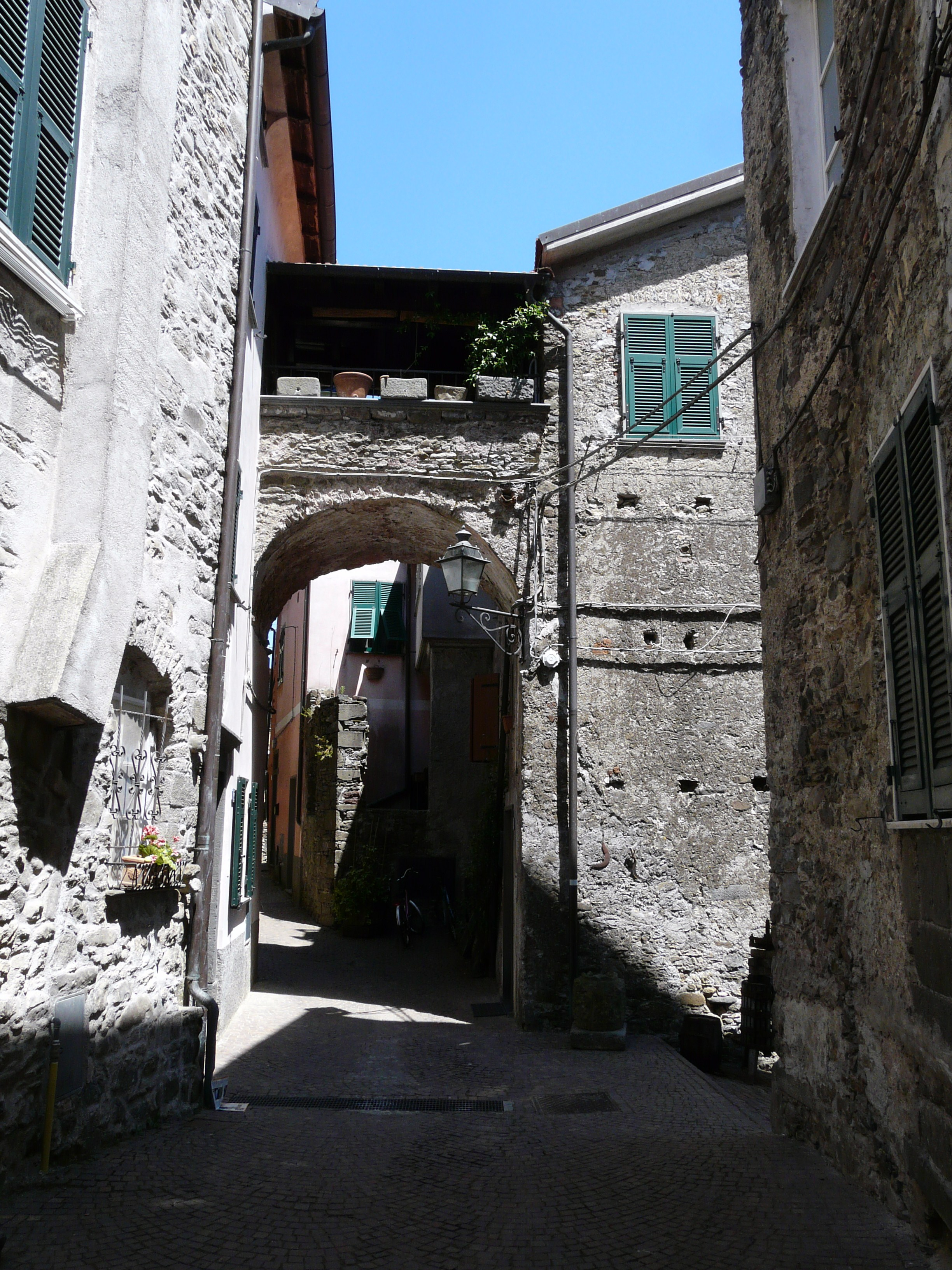 Centro storico, Pignone, Liguria, Italia